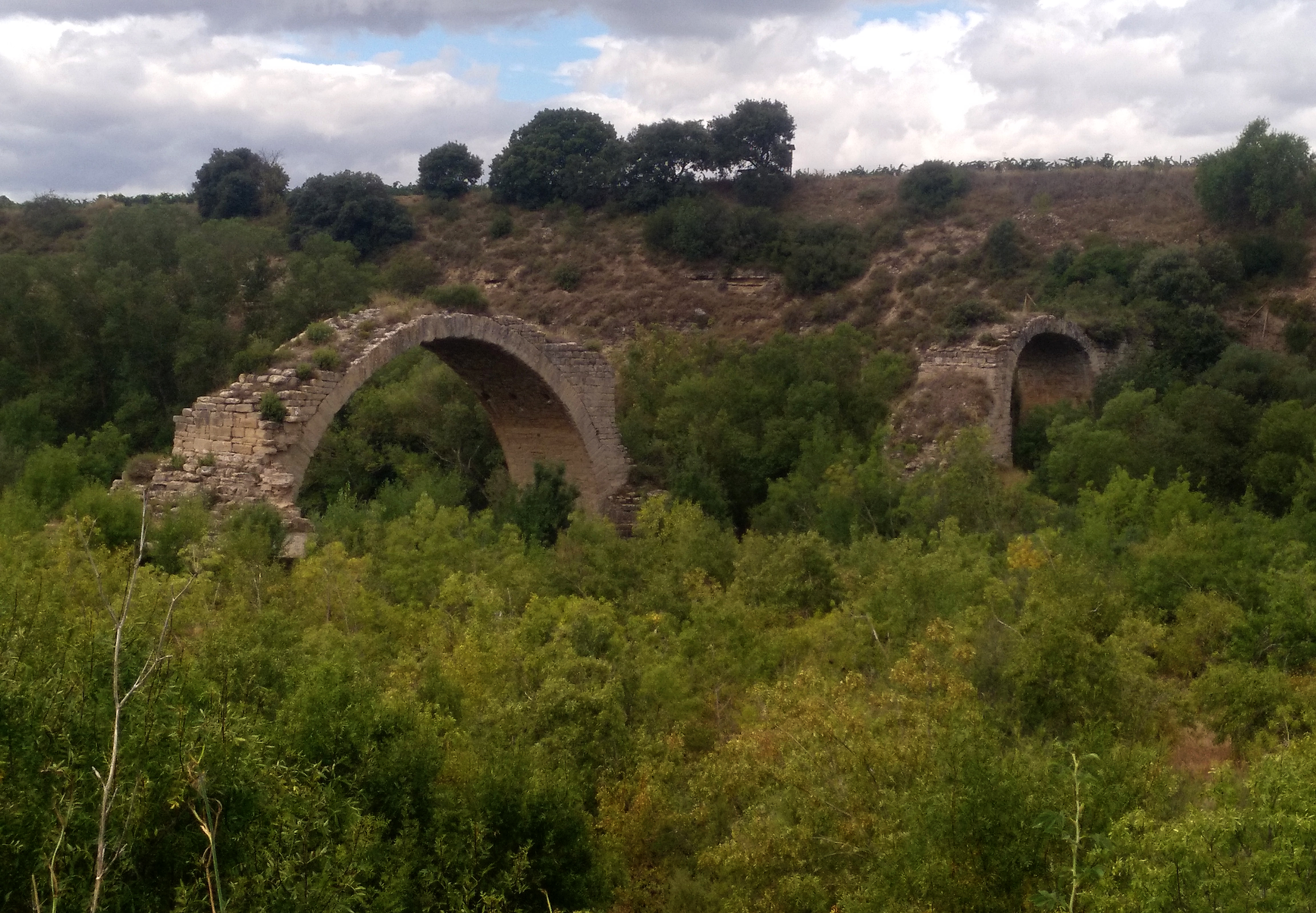 Mantible zubia, Lantziegoko Assa auzoan